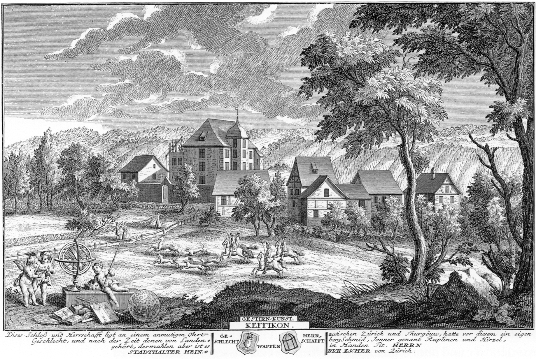 Schloss Kefikon 1741 auf einer Radierung von David Herrliberger nach einer getuschten Federzeichnung von Johann Caspar Ulinger. Erschienen in Herrlibergers Eigentliche Vorstellung der Adelichen Schlösser im Zürich Gebieth, Nr. 4, erste Lieferung 1741.